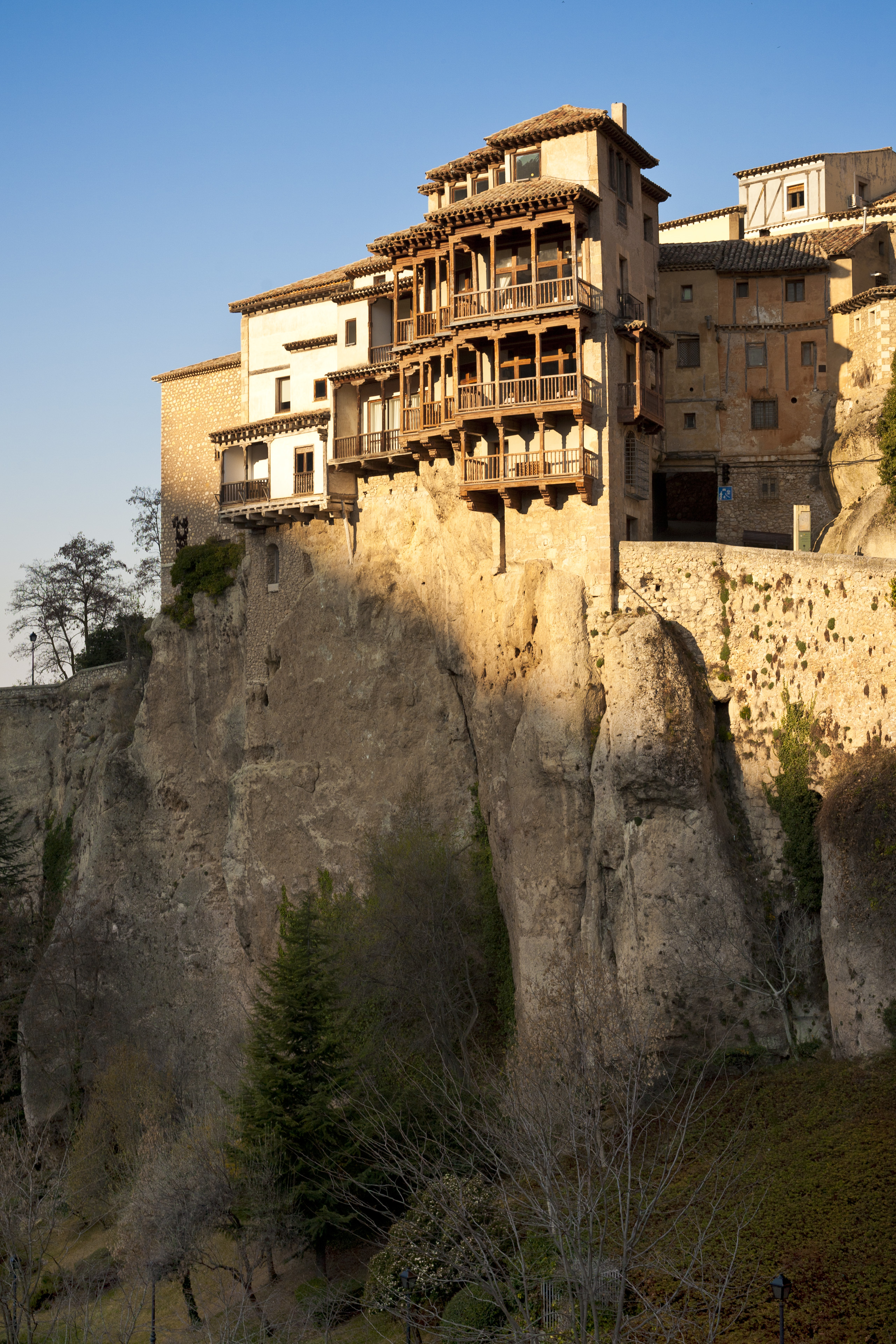 Vista de las famosas Casas Colgadas de Cuenca (Castilla-La Mancha, España).